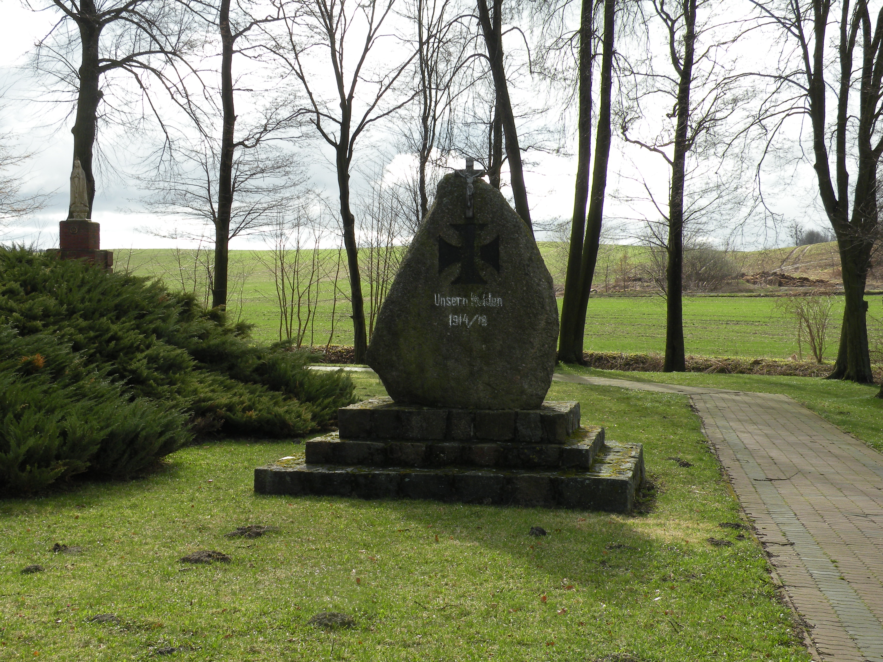 Głaz pamiątkowy przy kosciele